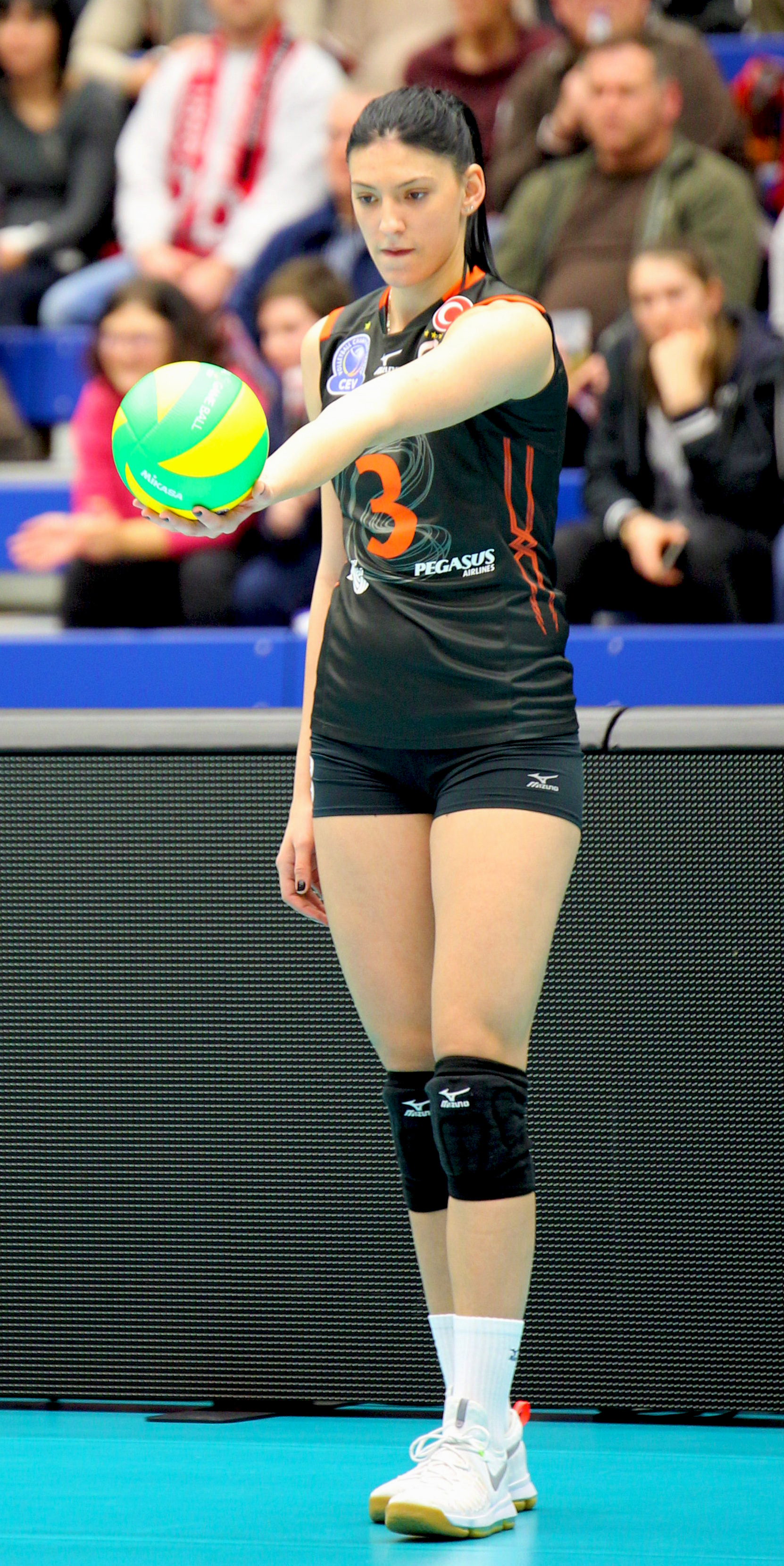 Tijana Boskovic, Eczacıbaşı Istanbul